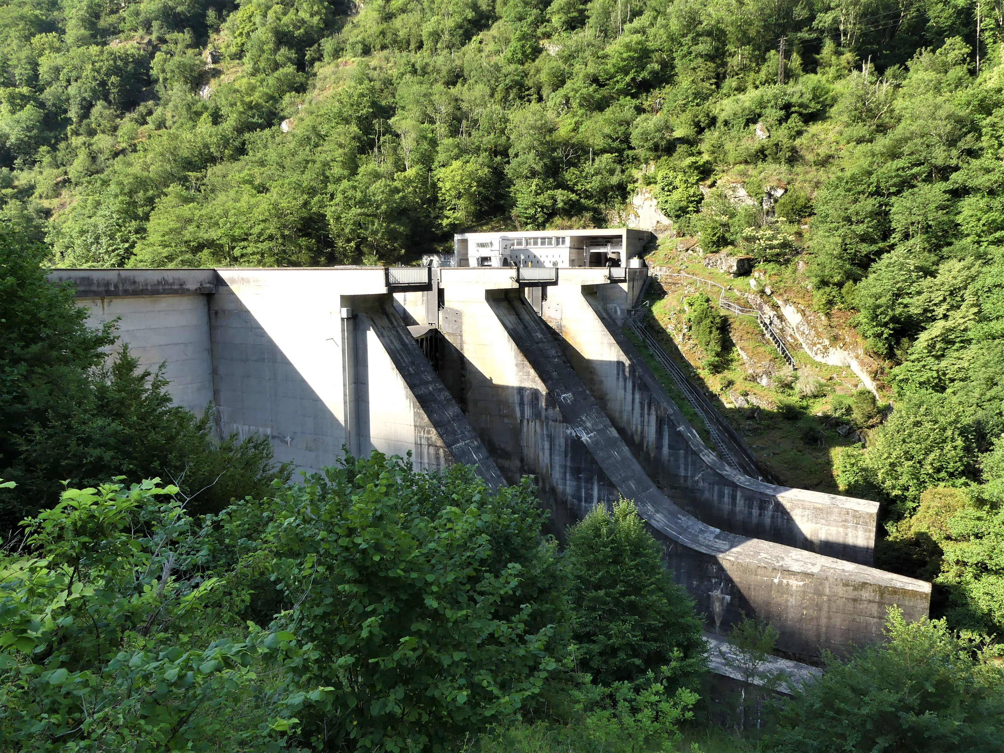 Le barrage de Golinhac sur le Lot, entre les communes du Nayrac (au premier plan) et Golinhac (sur l'autre rive) ; Aveyron, France.